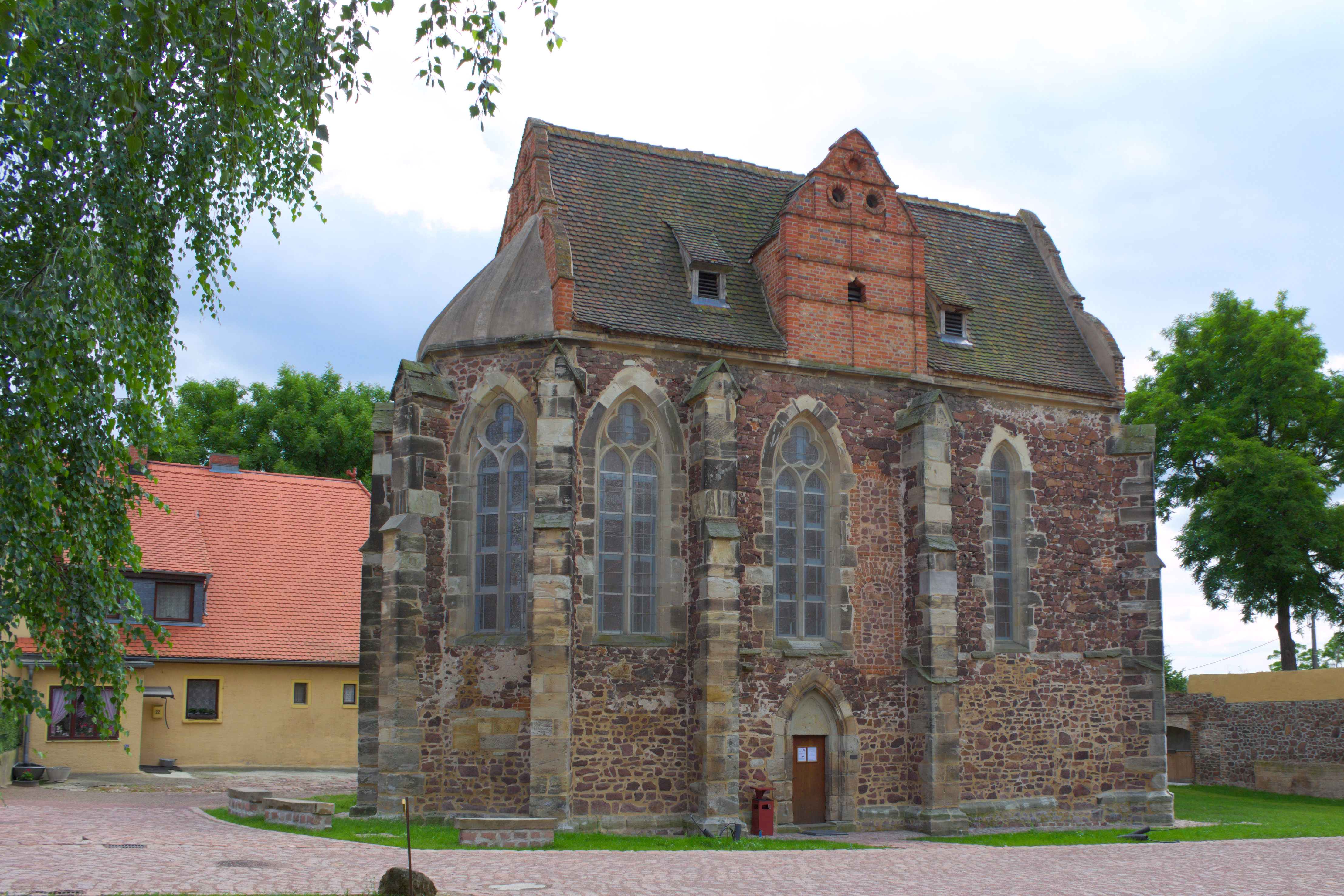 Templerkapelle